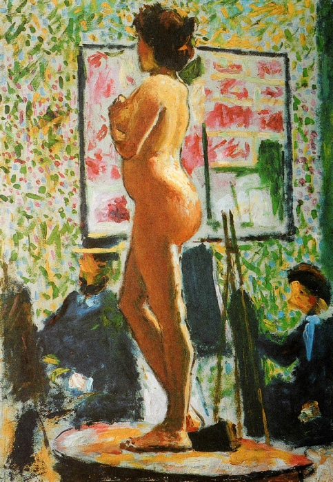 Nu fauve